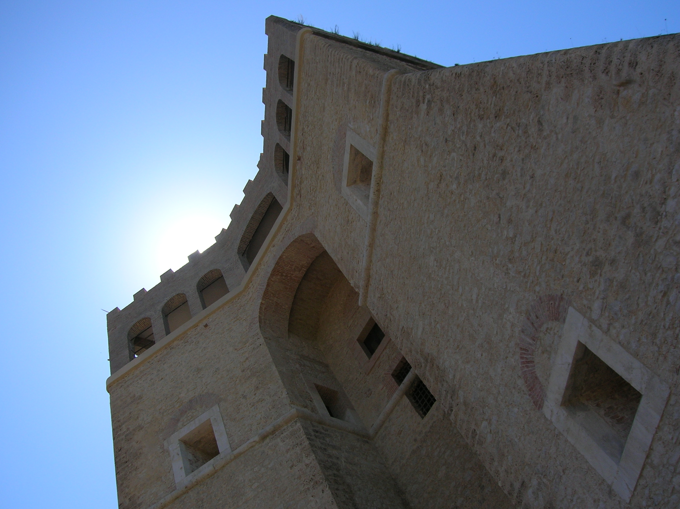 Castello Rocca Sinibalda, Provincia di Rieti, Lazio, Italia